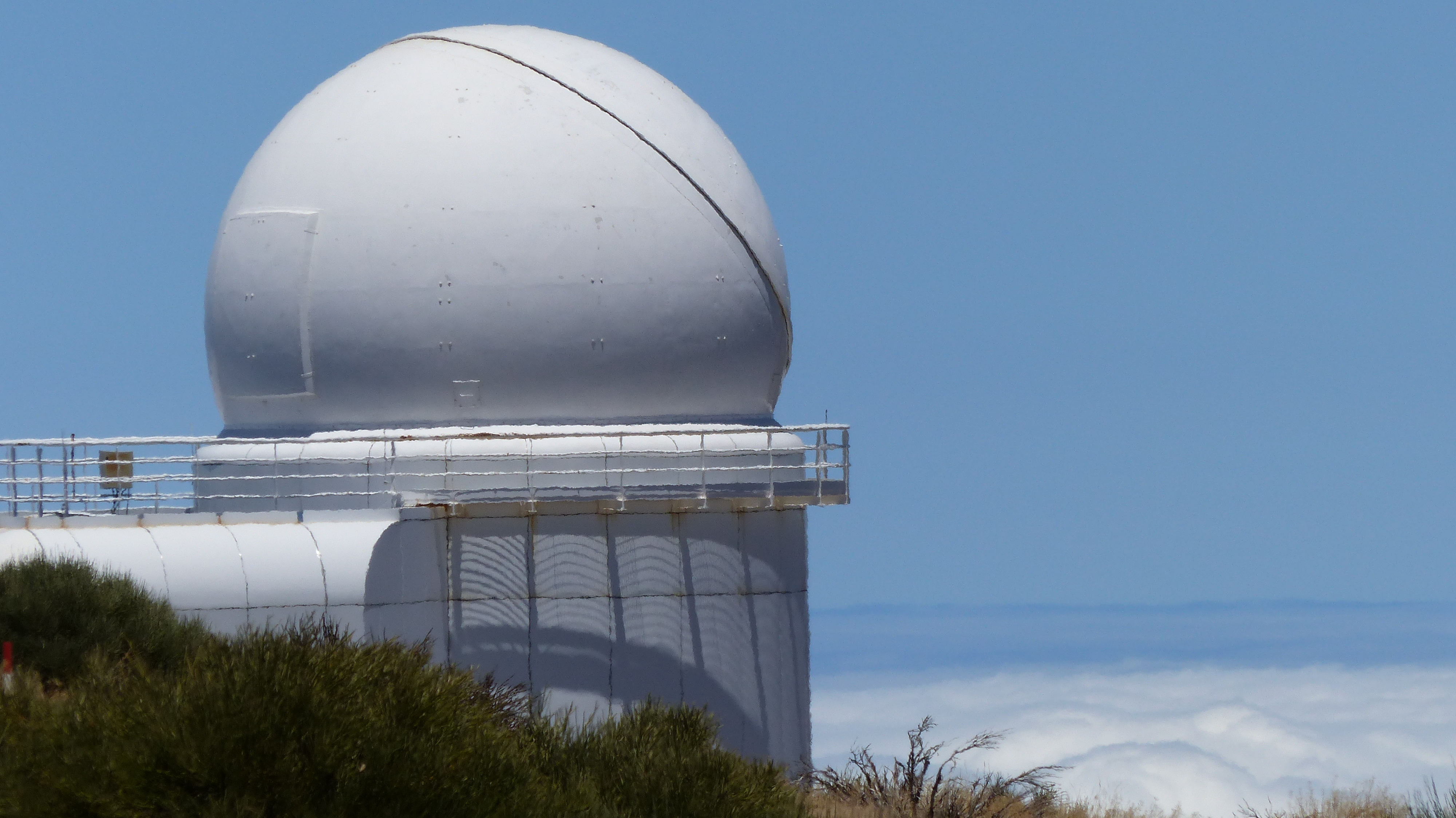 Observatorio del Teide, sobre las nubes.